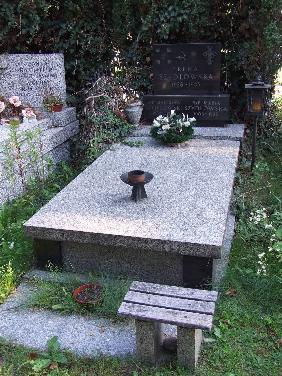 Grób Ireny Szydłowskiej na cmentarzu na Wólce